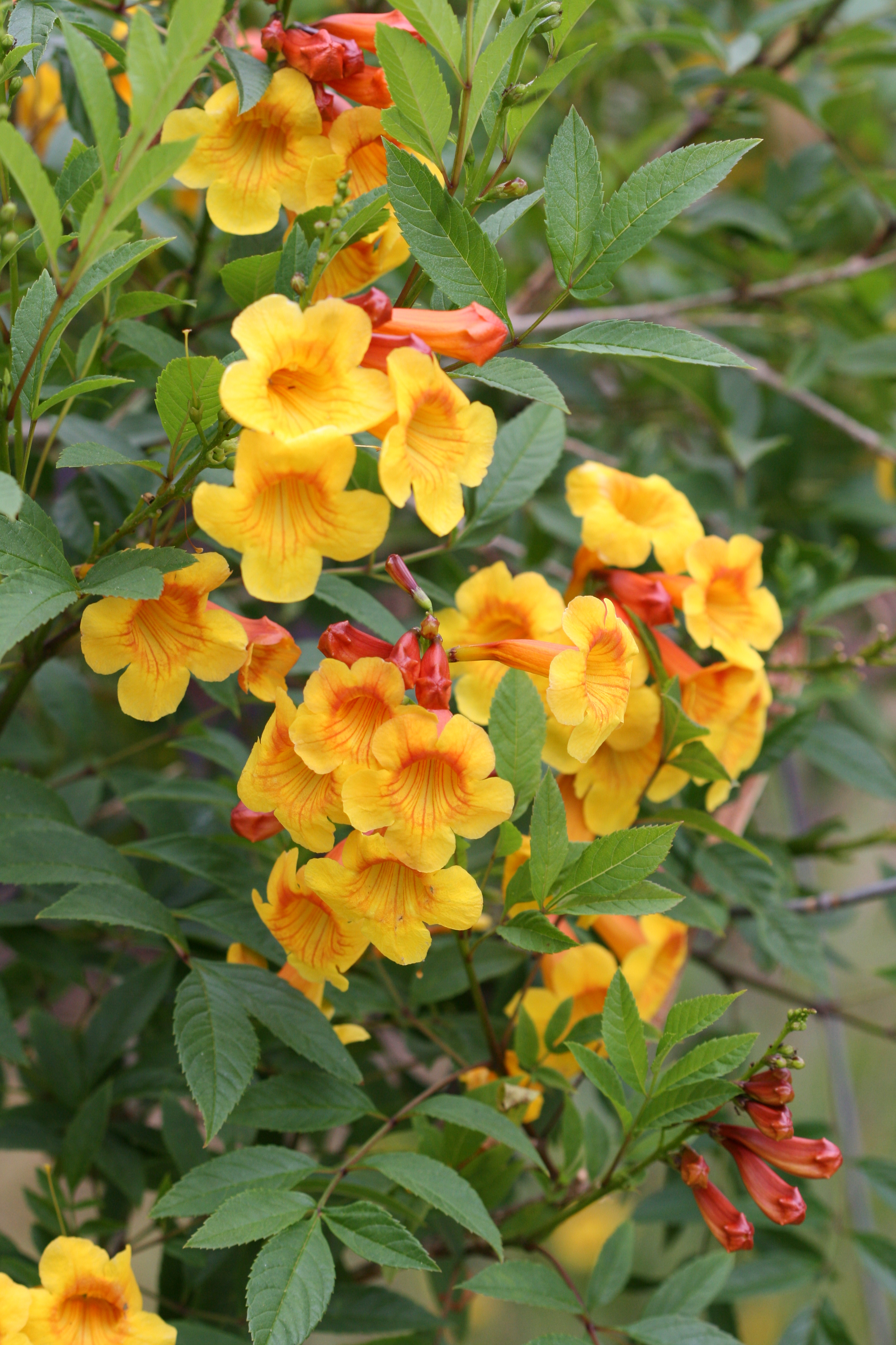 Tecoma fulva subsp. guarume 'Flaming Belles'